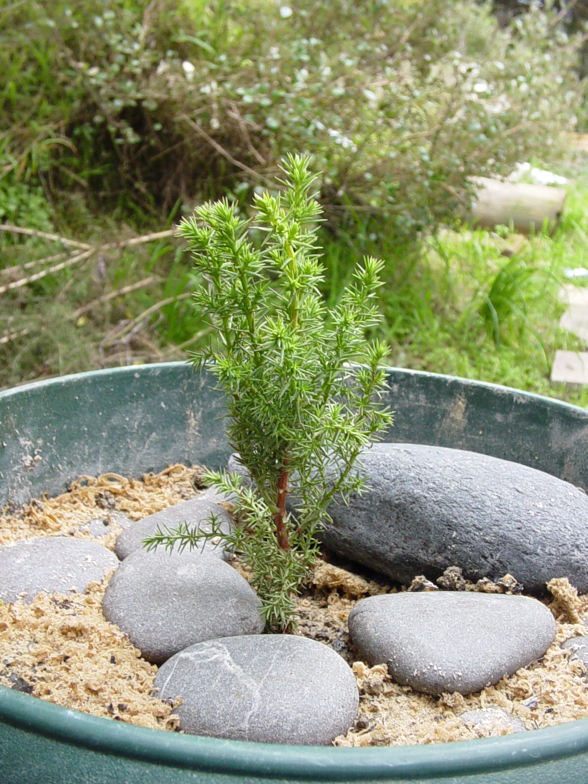 Cupressus macrocarpa, seedling